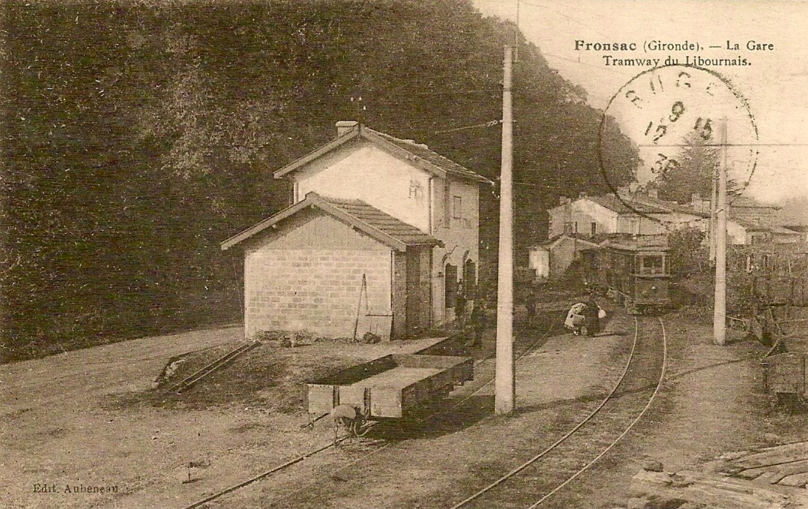 Fronsac on post-cards